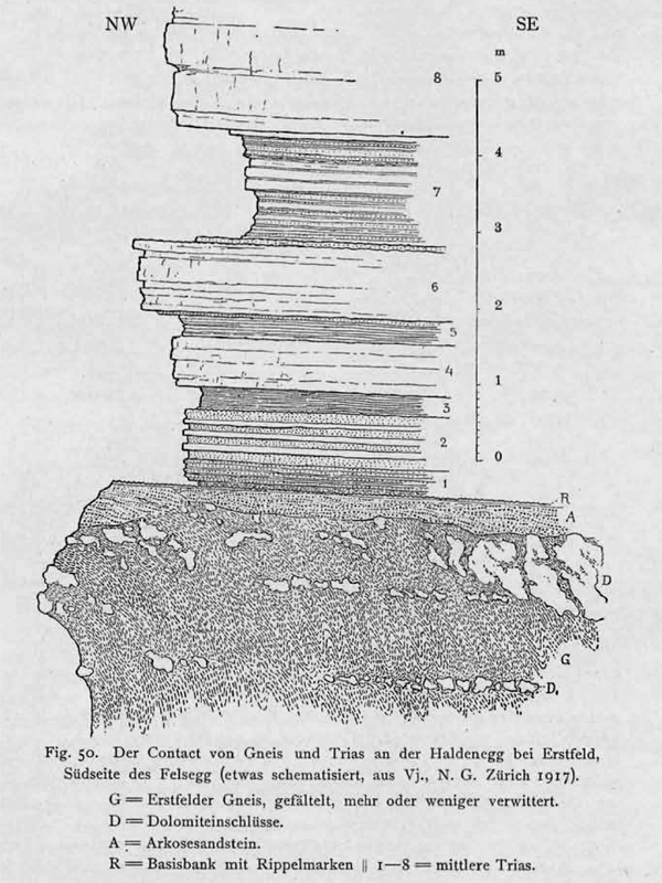 Scheidnössli bei Erstfeld, Kanton Uri, Schweiz